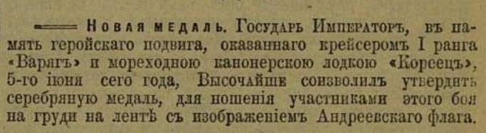 Статья о учреждении медали